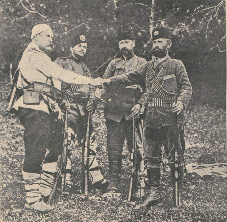 Алфред Хейлс, Борис Тагеев, Стефан Николов и Иван Цончев.